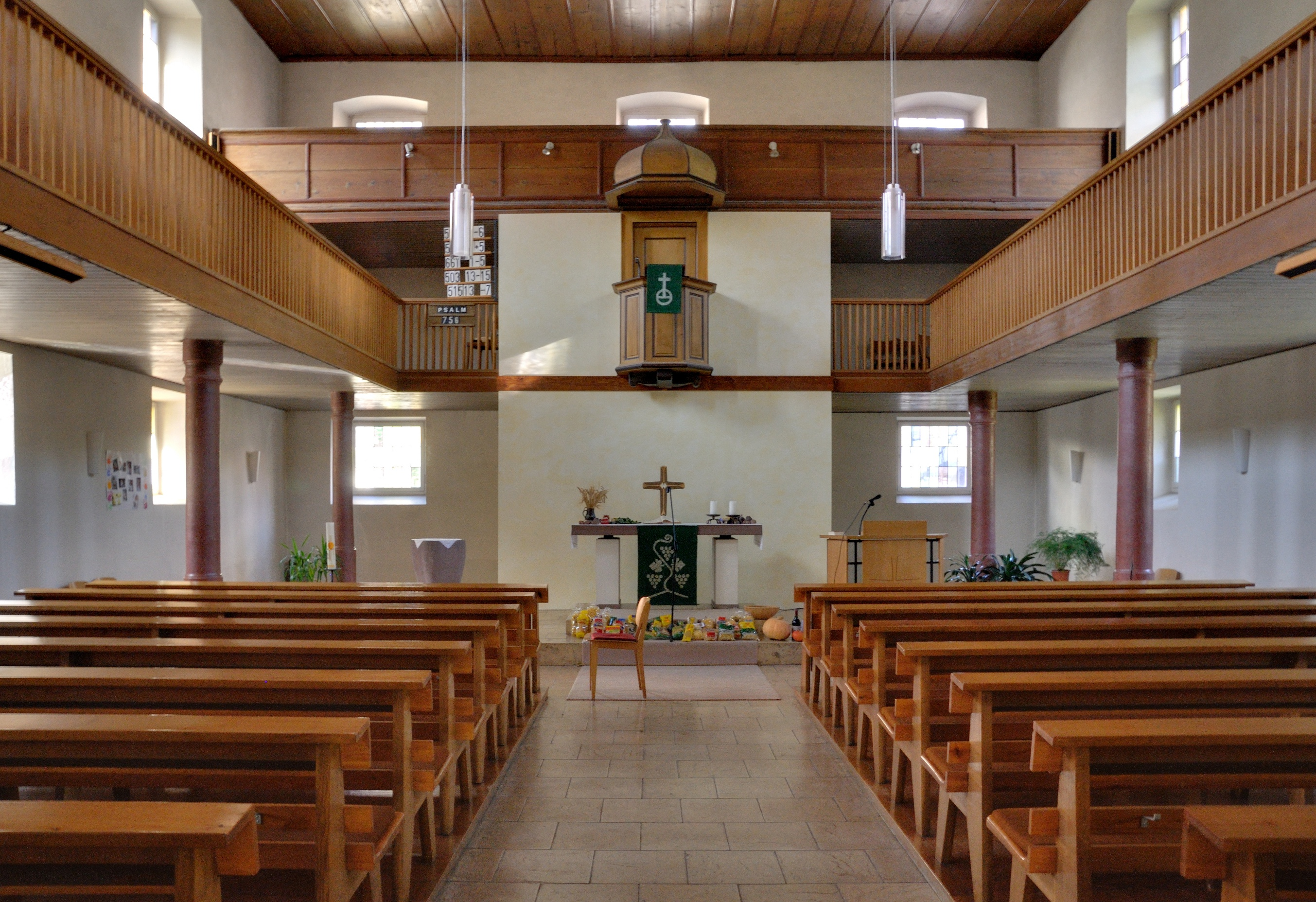 Wies: Langhaus der Evangelischen Kirche Wies mit Blick zum Altar